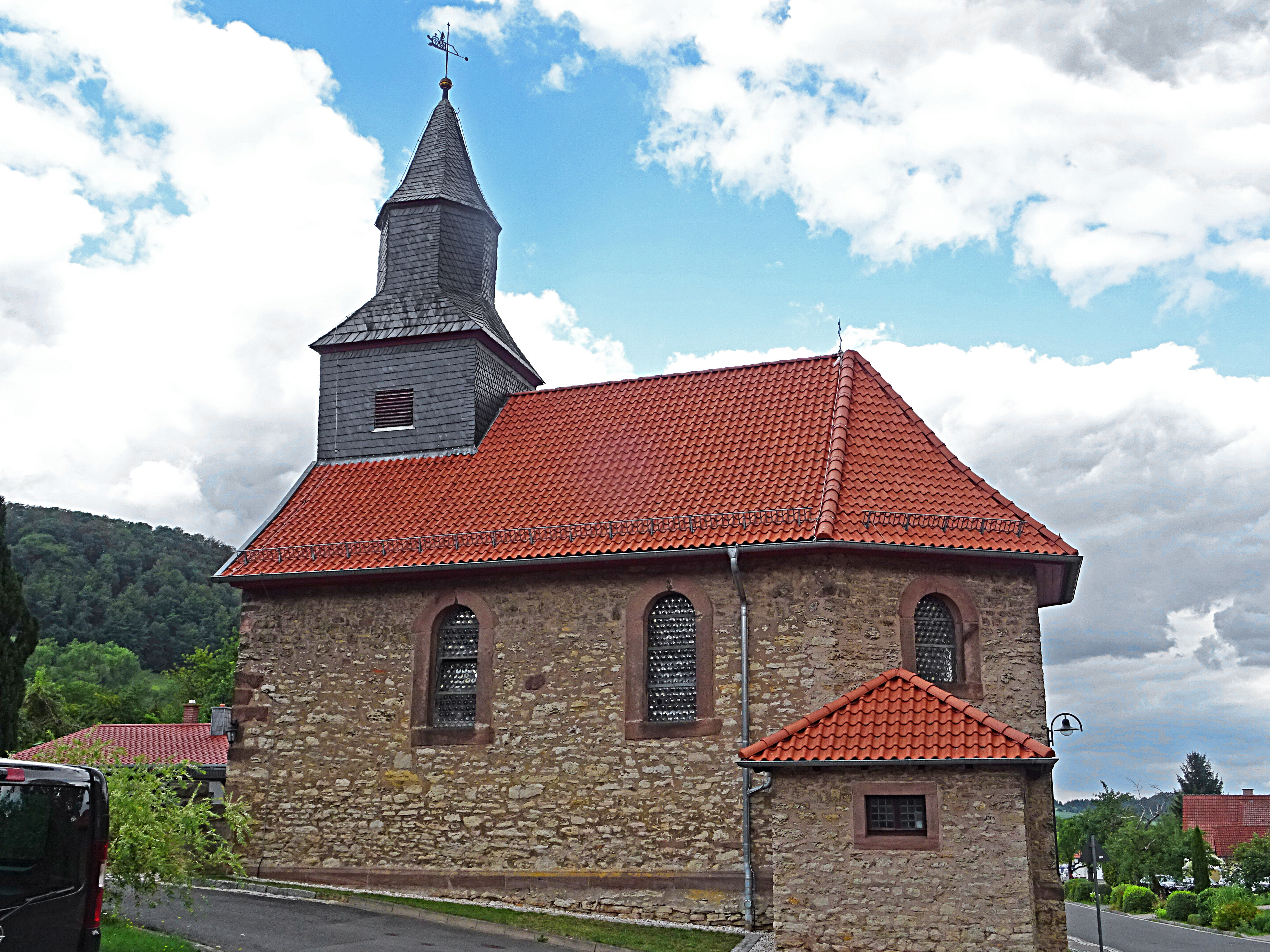 Dorfkirche St. Michael (Schönhagen) von Südosten